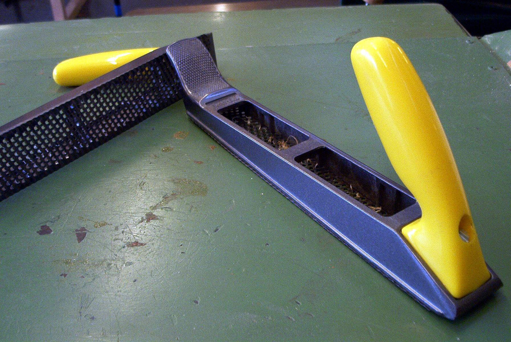 Schaafrasp